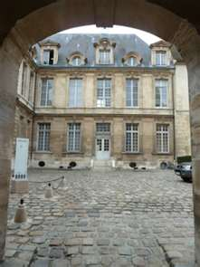 Entrée de l'Hôtel de Miramion